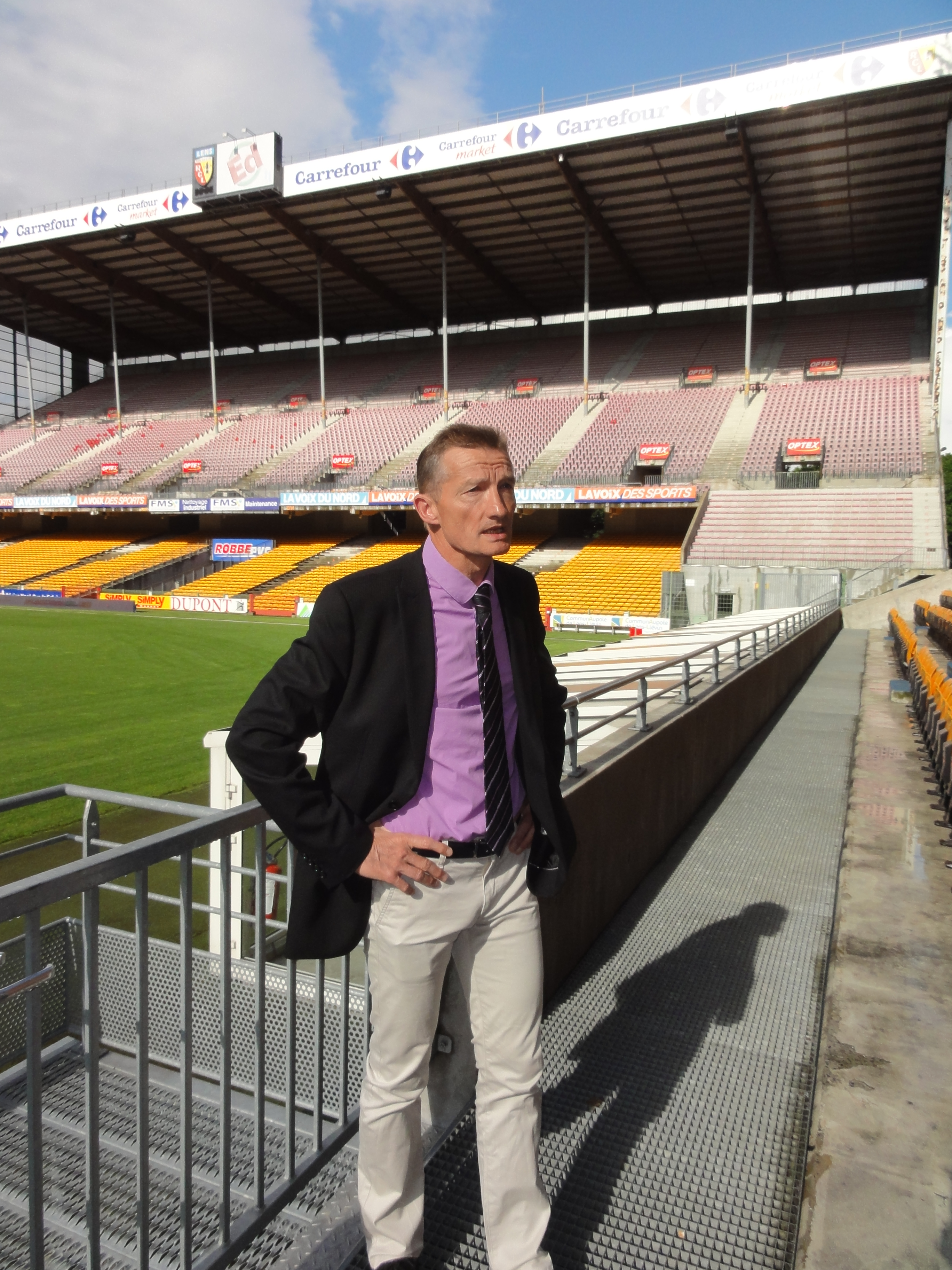 Le Stade Félix-Bollaert à Lens a été utilisé le vendredi 6 juillet 2012 pour fêter de manière officielle le classement de 353 éléments répartis sur 109 sites du bassin minier du Nord-Pas-de-Calais au patrimoine mondial de l'Unesco.